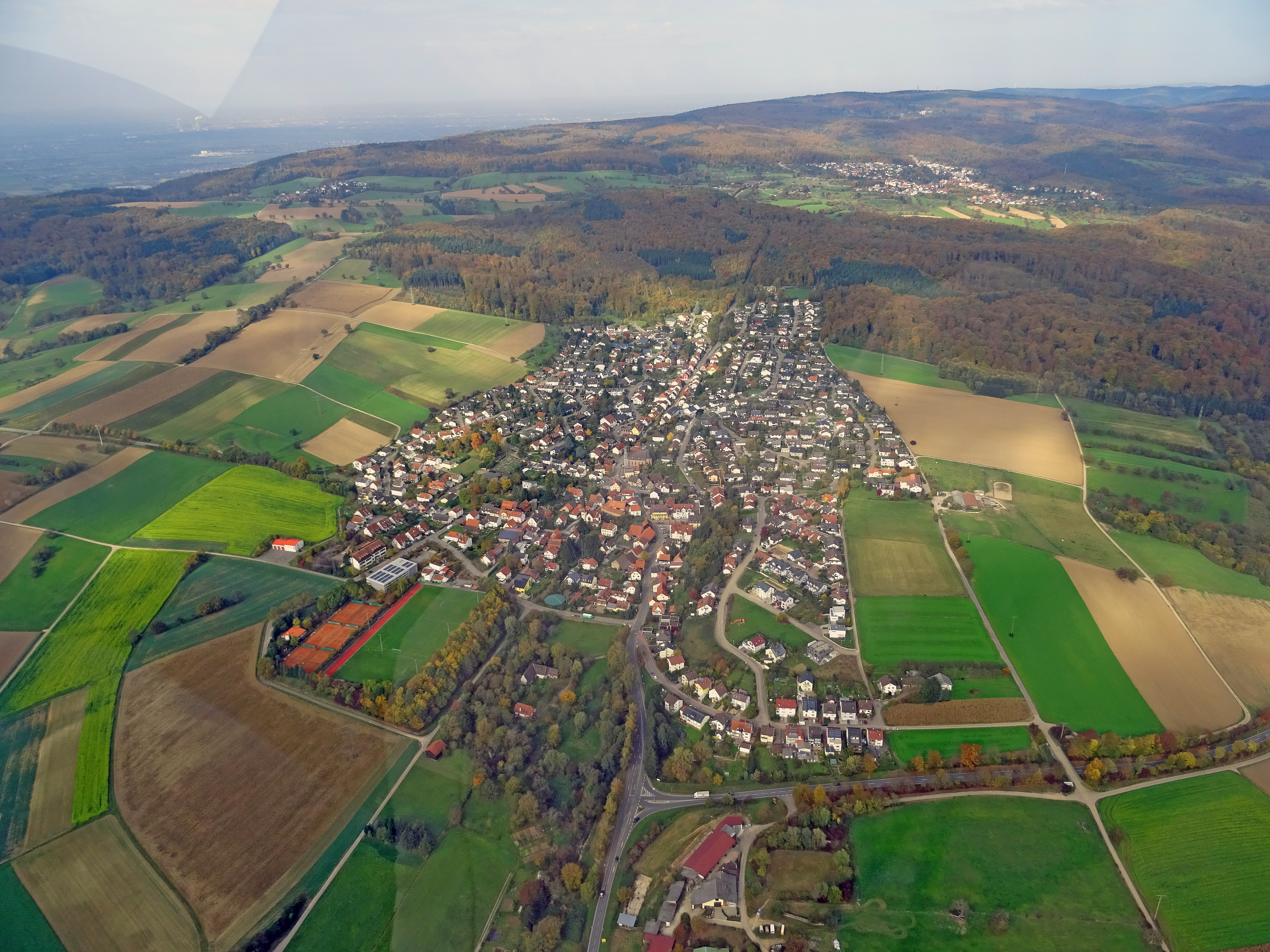 Ortsteil Gauangelloch der Stadt Leimen, Rhein-Neckar-Kreis